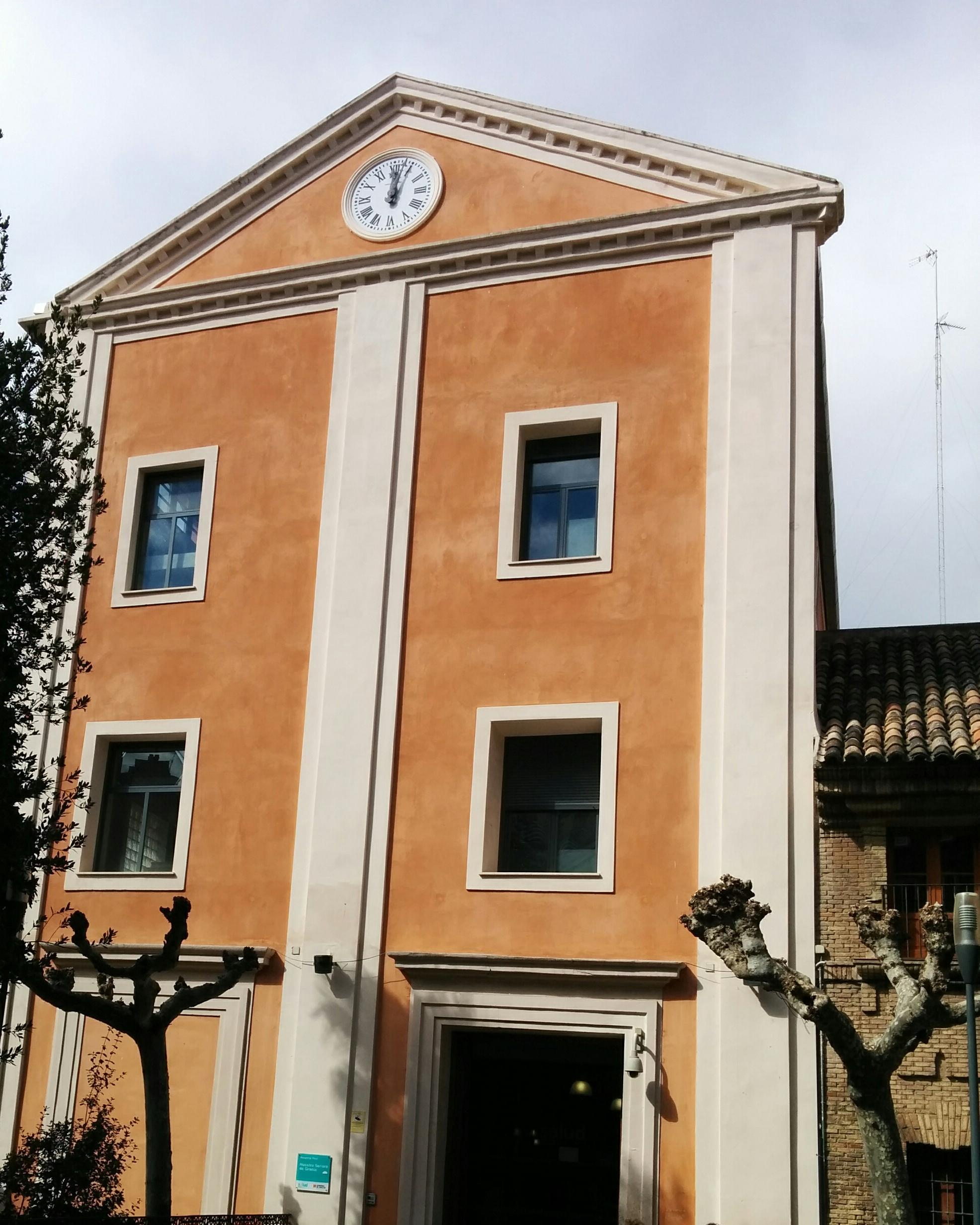 Puerta principal del Hospital Provincial de Nuestra Señora de Gracia (Zaragoza).